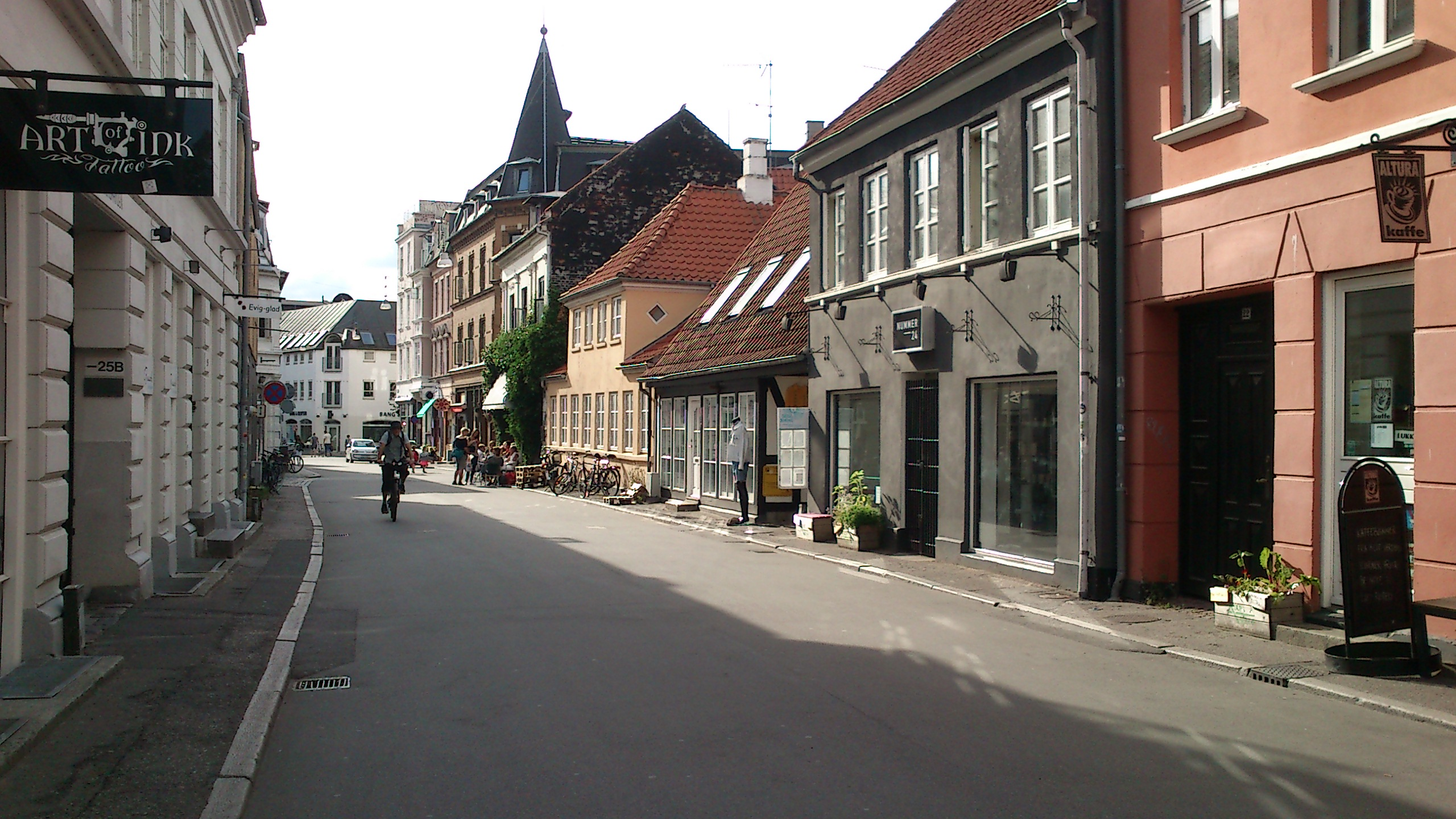 Graven i Latiner kvarteret i Århus.